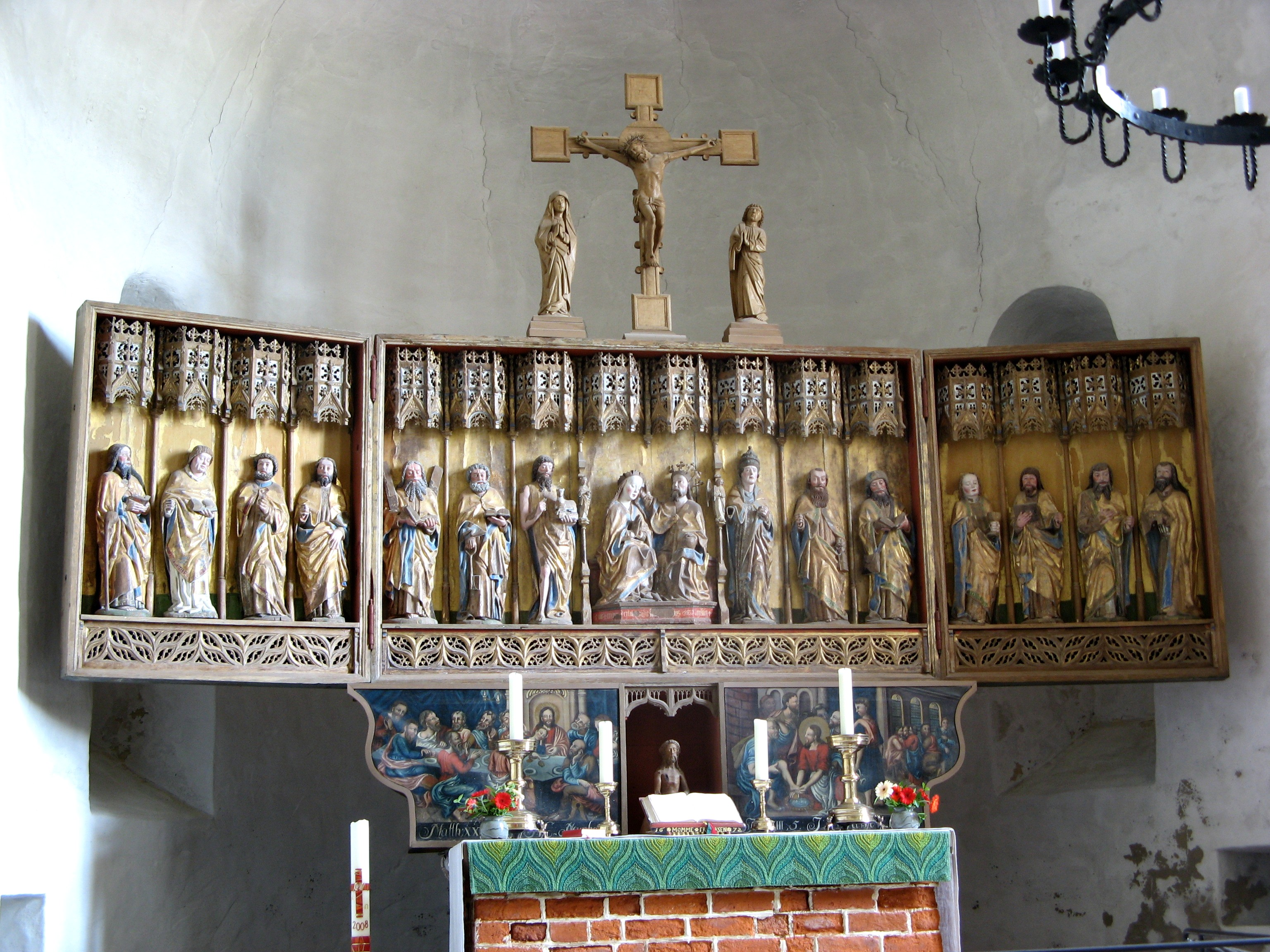 Altar der Kirche St. Johannis in Nieblum